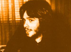 Pedro Pujó en 1968